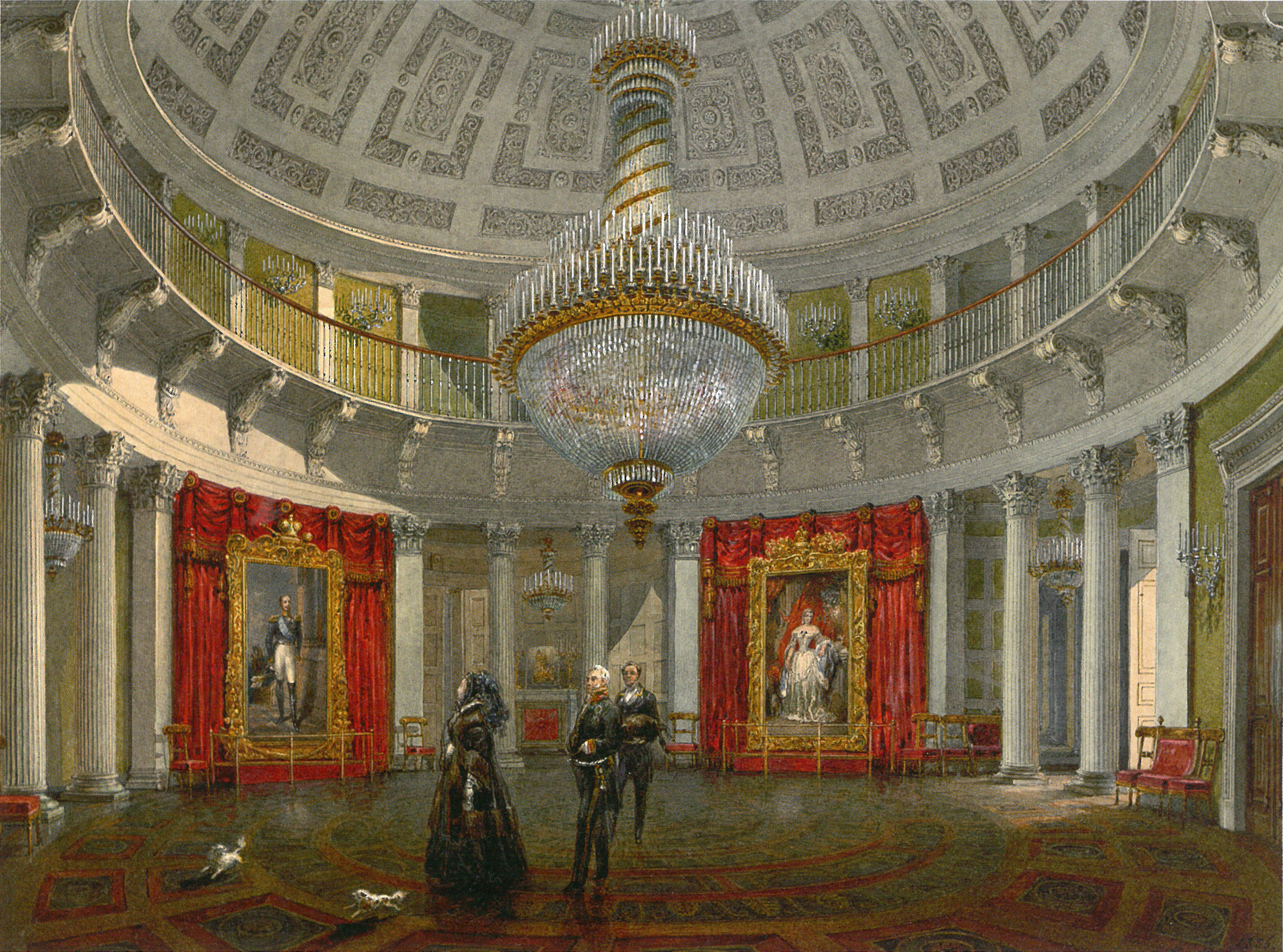 Ротонда Зимнего дворца. Акварель Василия Семёновича Садовникова середины XIX века, Государственный Эрмитаж